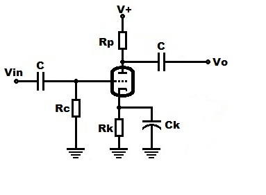 Esquema d'una etapa de potencia usant un tríode.